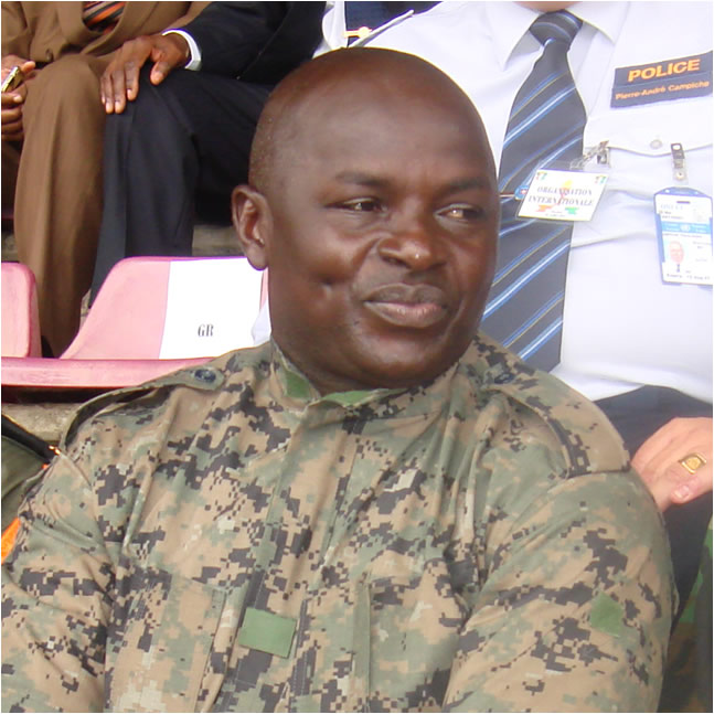 Tuo Fozié, ancien Ministre de la jeunesse et des sports, Directeur général de la police des Forces nouvelles, Côte d'Ivoire